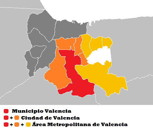 Mapa del Área Metropolitana de Valencia / Gran Tacarigua (Venezuela)